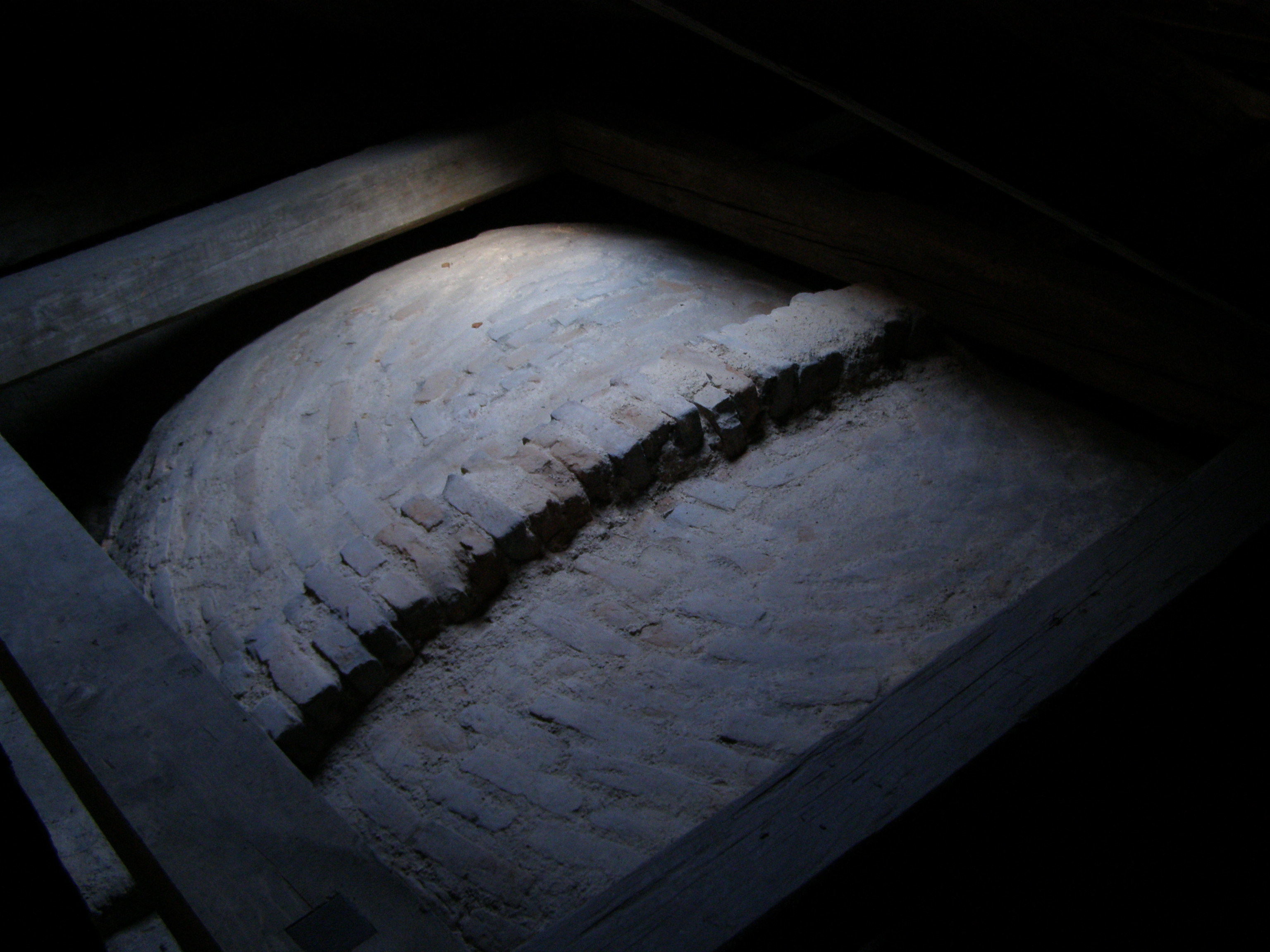 Česky: Kutná Hora, část Sedlec, klášterní kostel Nanebevzetí Panny Marie a svatého Jana Křtitele, půda, klenba boční lodi